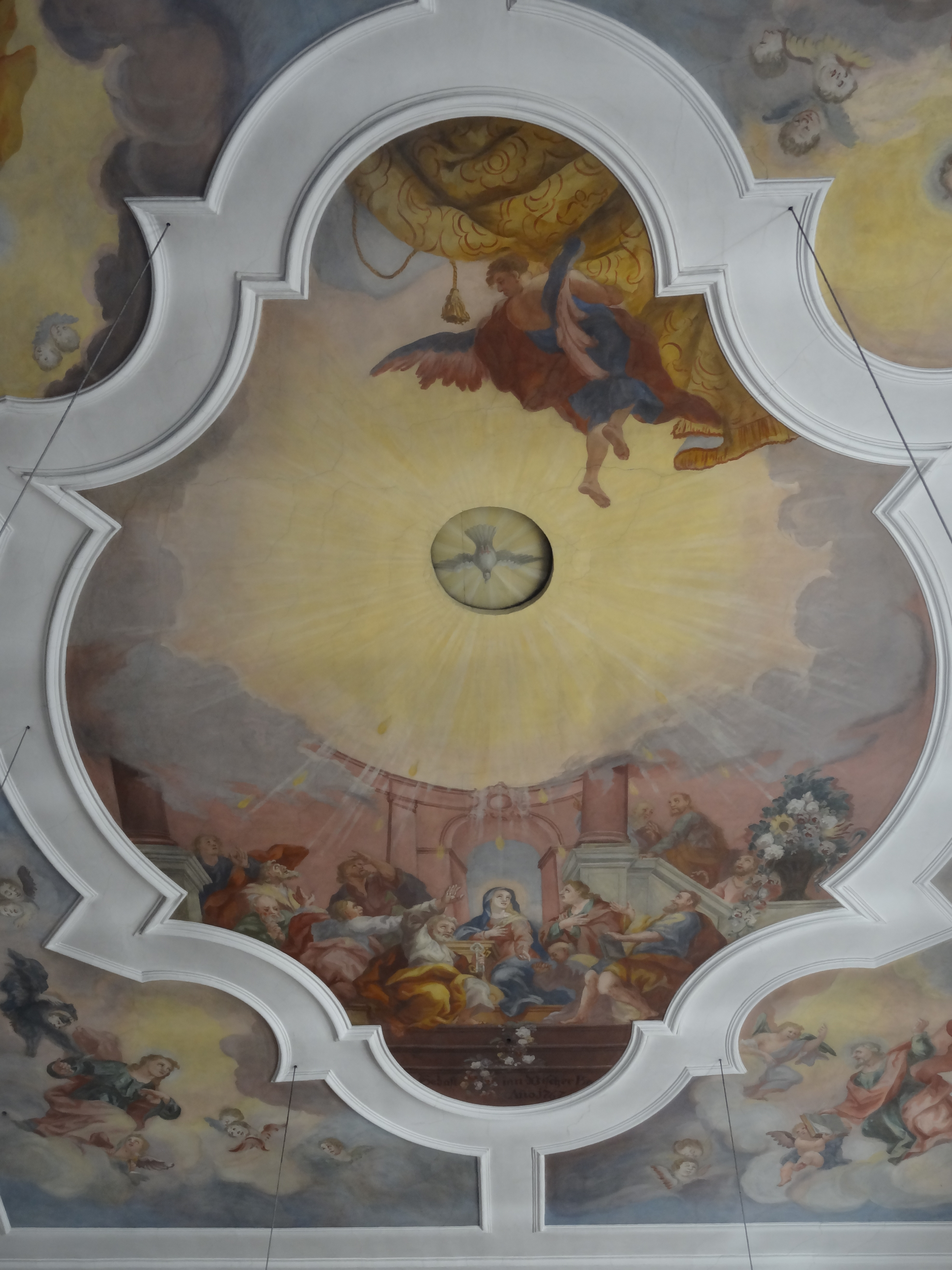 Deckenfresko im Langhaus der Pfarrkirche Mariä Heimsuchung in Ergolding